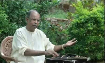 പള്ളിക്കൽ മൊയ്തീൻ